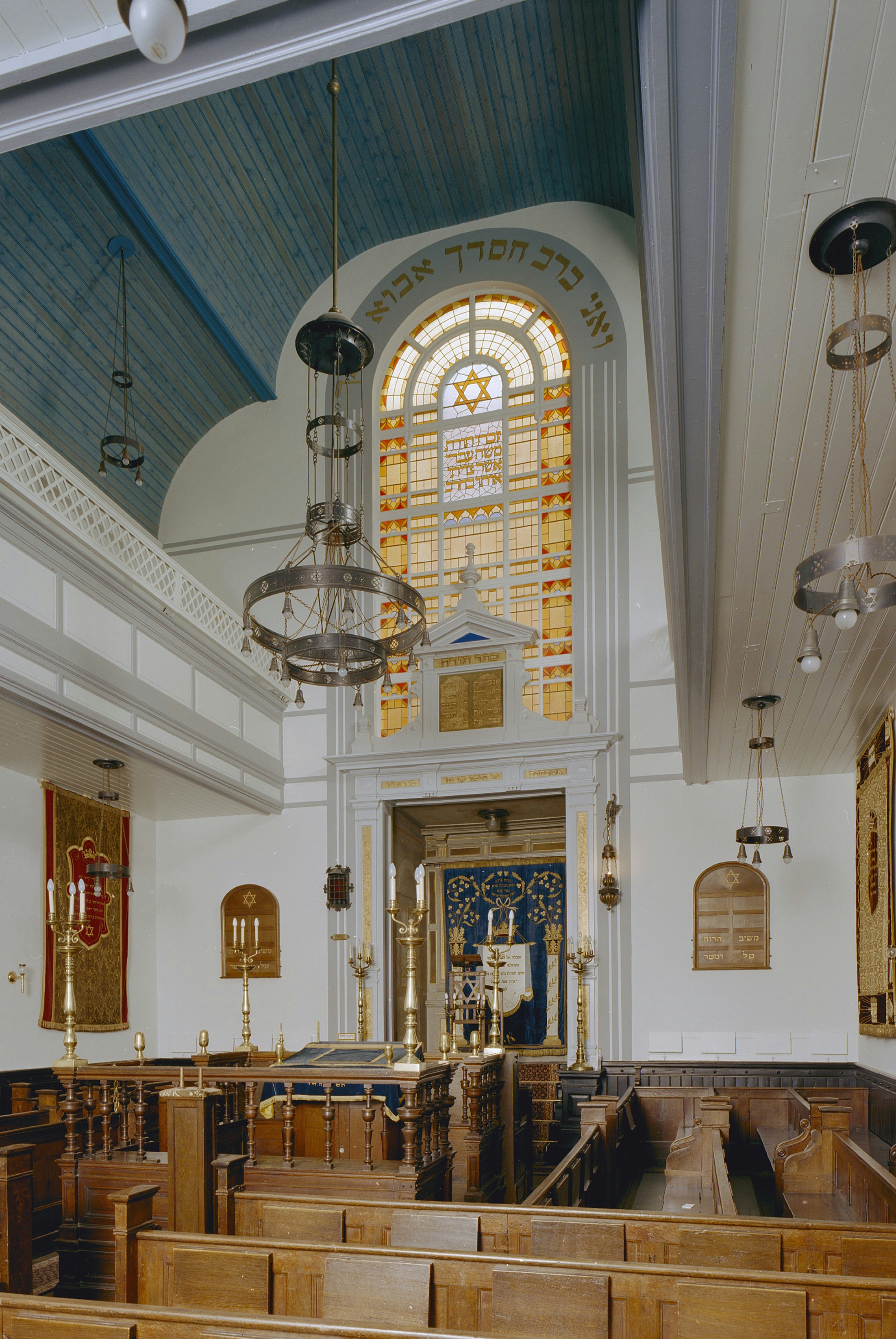 Synagoge: Gebedsruimte van de synagoge aan de Gerard Doustraat te Amsterdam met biema (= verhoging voor het voorlezen van de Tora) en gebrandschilderd raam, gezien naar de Heilige Arke aan de oostkant van het gebouw